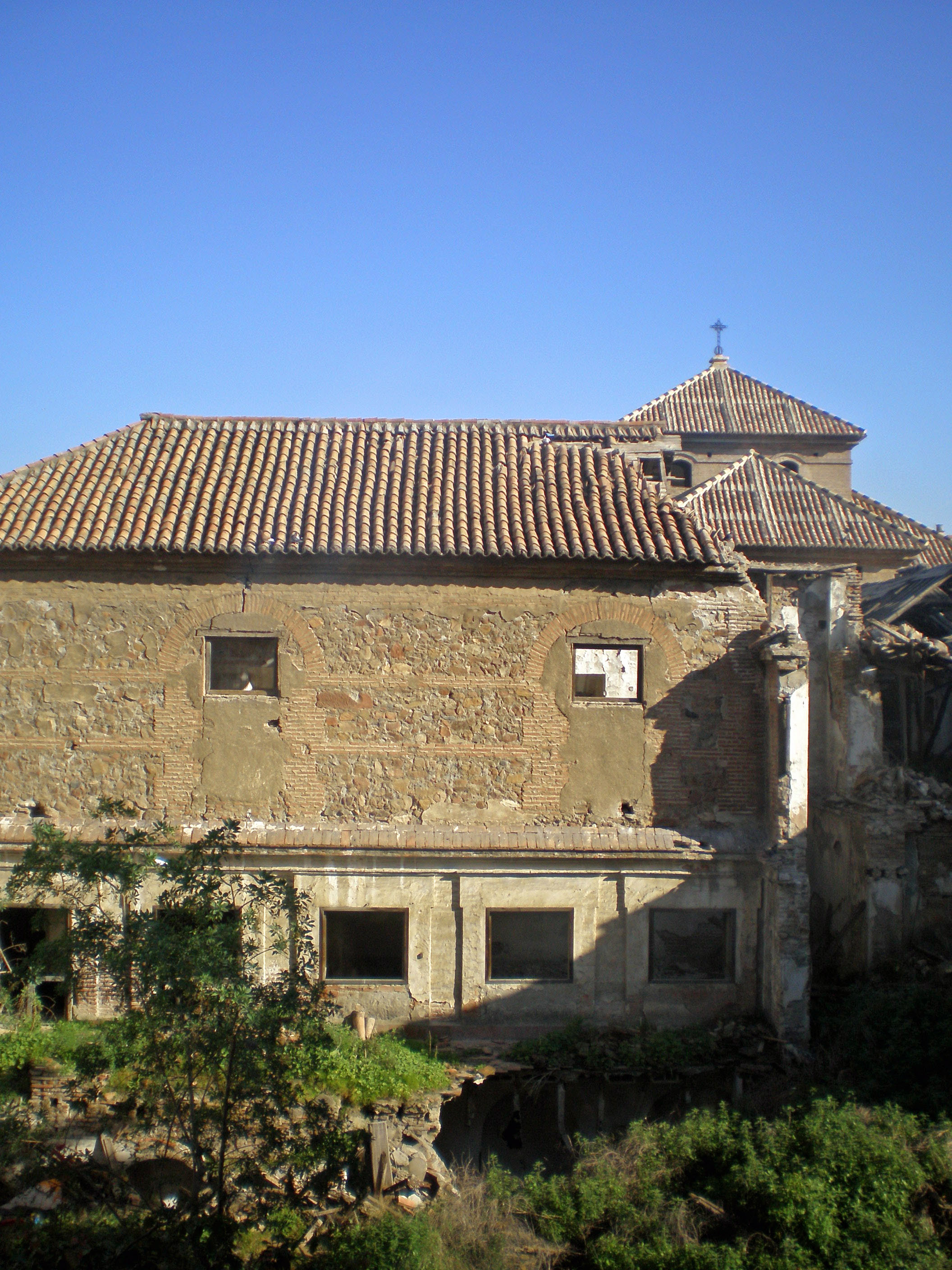 Convento de San Andrés de Málaga en 2007